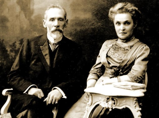 Бацькі А. Р. Штама. Роберт-Горфрыд і Эма-Элеанора. 1910-я